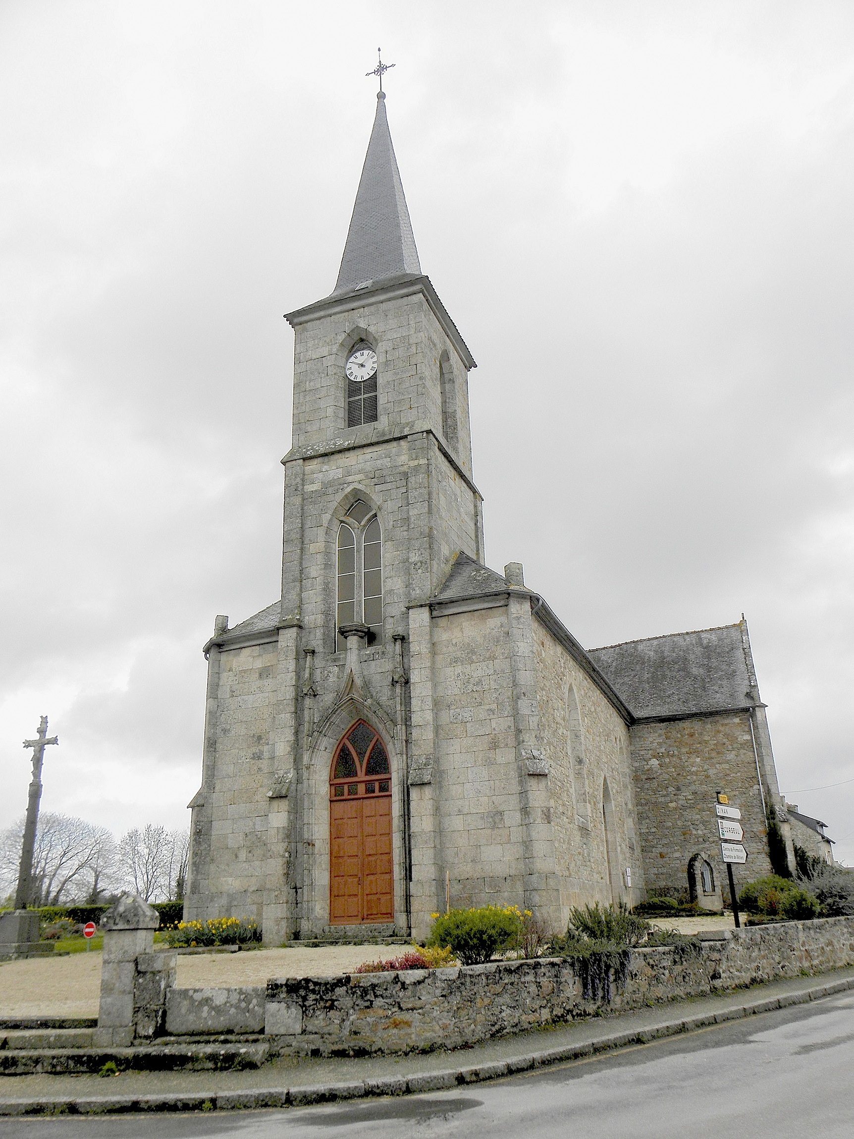 Façade occidentale de l'église Saint-Symphorien d'Aucaleuc (22).